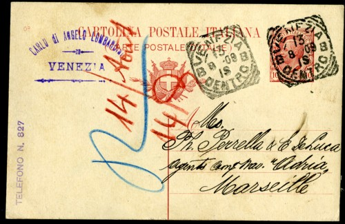 Immagine proveniente da collezione personale dell'autore raffigurante un annullo postale di tipo tondo-riquadrato